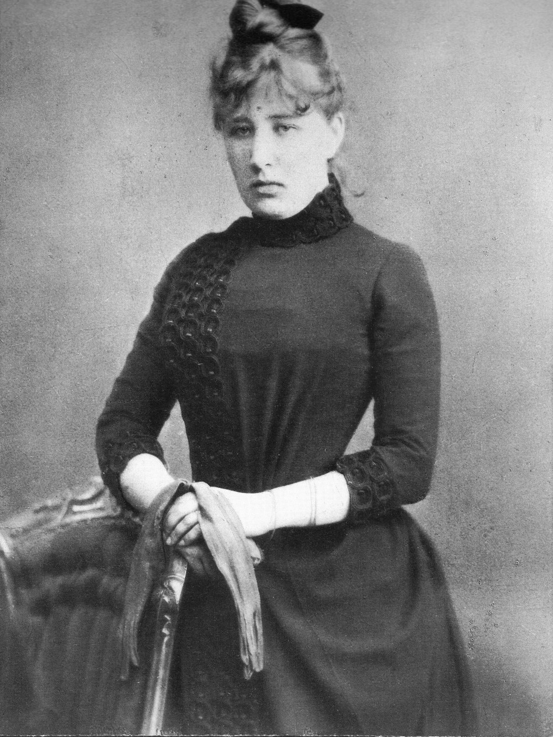 Надежда Петровна Ламанова. Фотография Андрея Осиповича Карелина. 1880-е гг. Предполжительно Нижний Новгород.